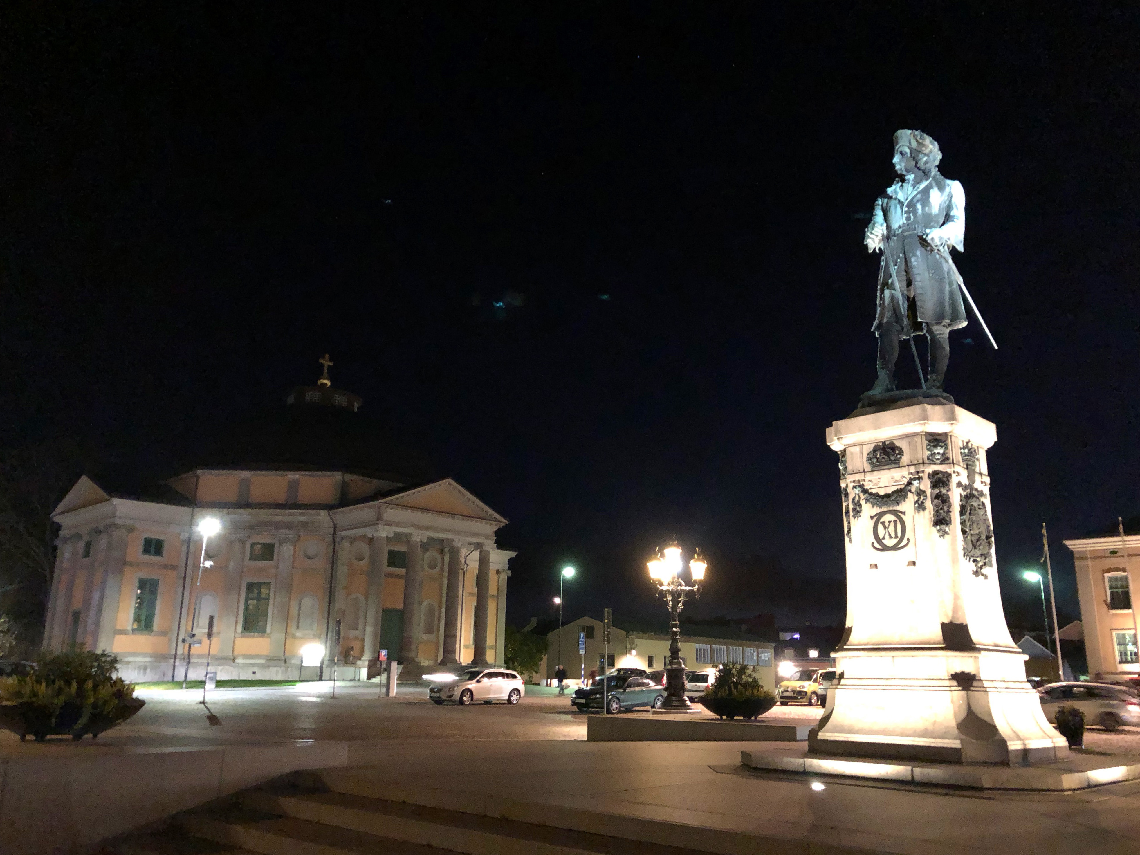 Карлскруна - памятник Карлу 11